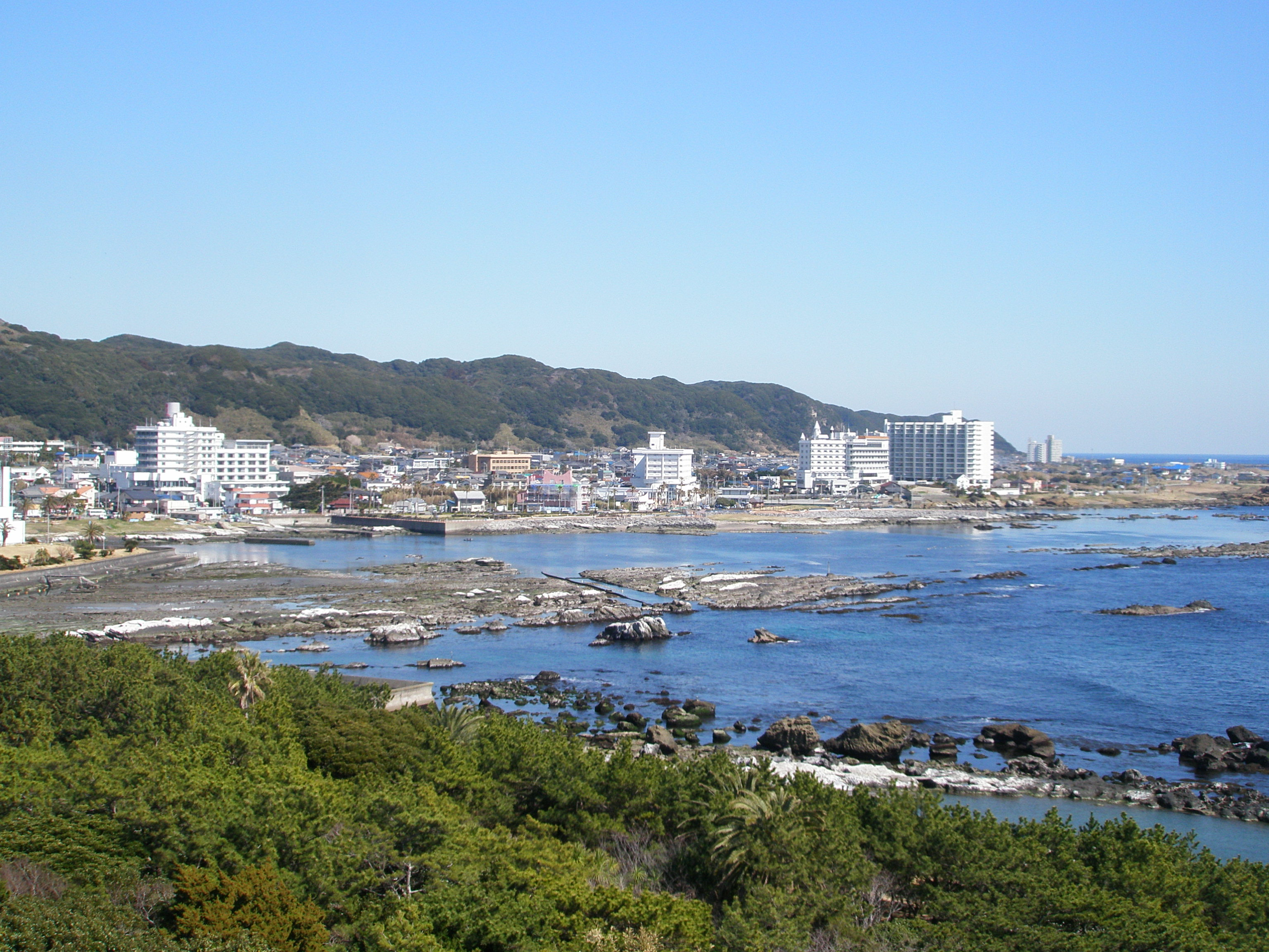 野島埼灯台からの眺望（東方向）。